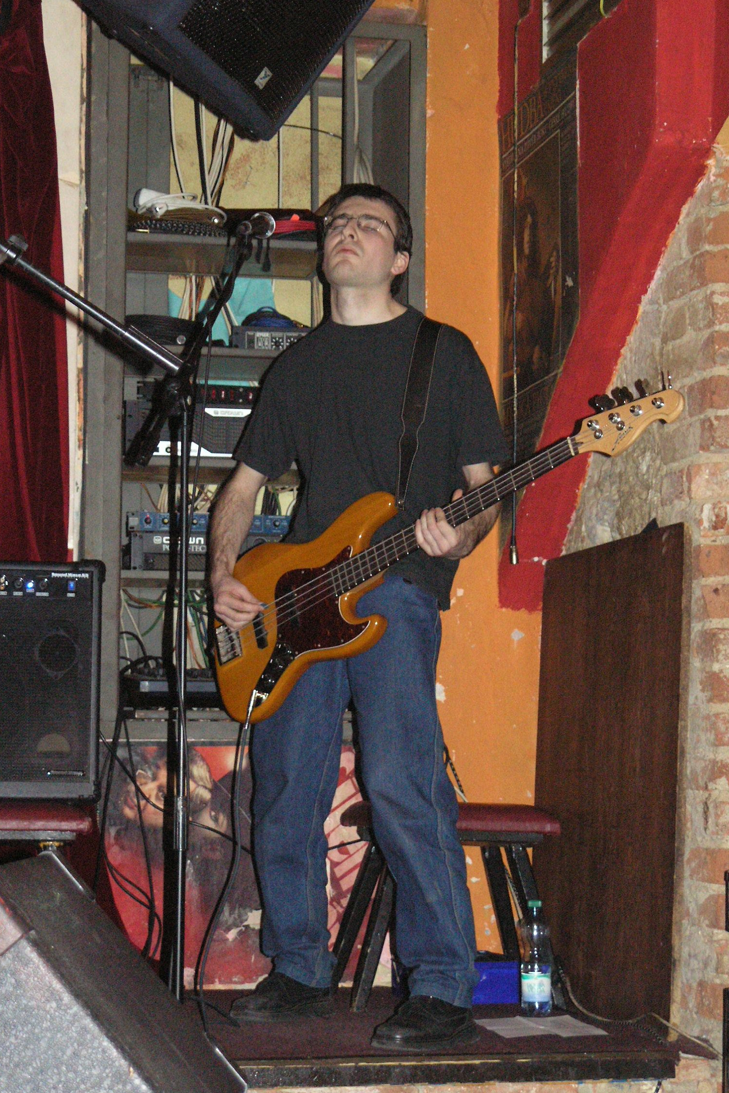 Koncert kapely Já a brácha (Praha, Bílá Hora)